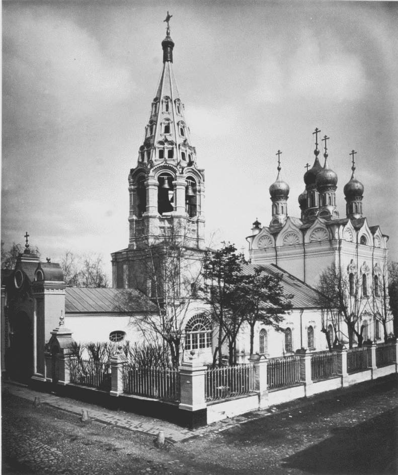 Спас на Песках (Храм Преображения Господня на Песках)